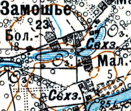 Топографическая карта Ленинградской области, квадрат Vc-29 (Батецкая), деревня Замошье